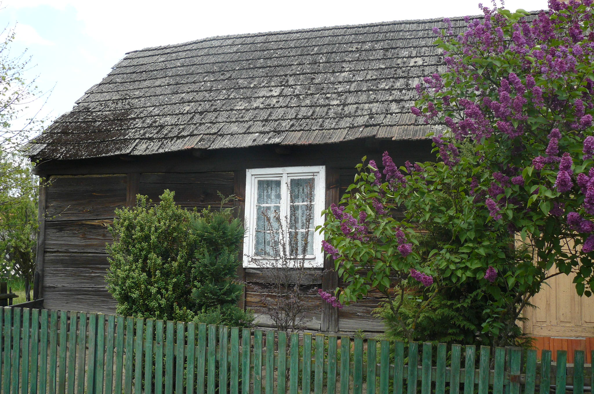 Chwaliszew. Stara zabudowa drewniana.